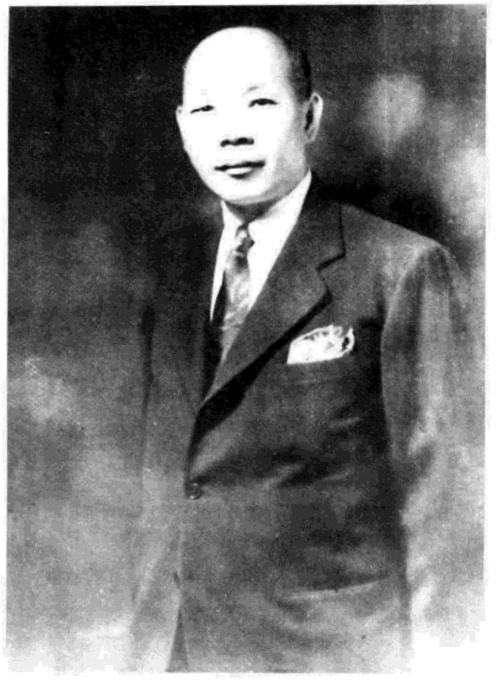 侯德榜院士